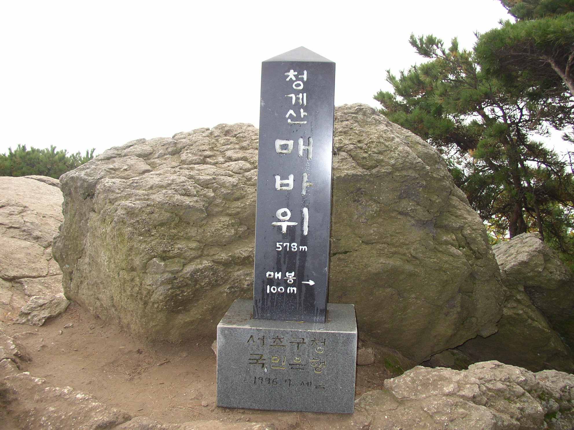 Maebawi of Cheong_gye_san at Seoul